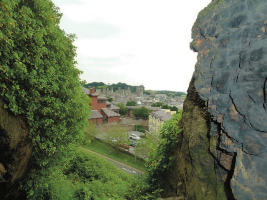 Gwrachen Gam, Twtil, Caernarfon, lloches i hen wrach unwaith, ond yr enw ar lafar o hyd